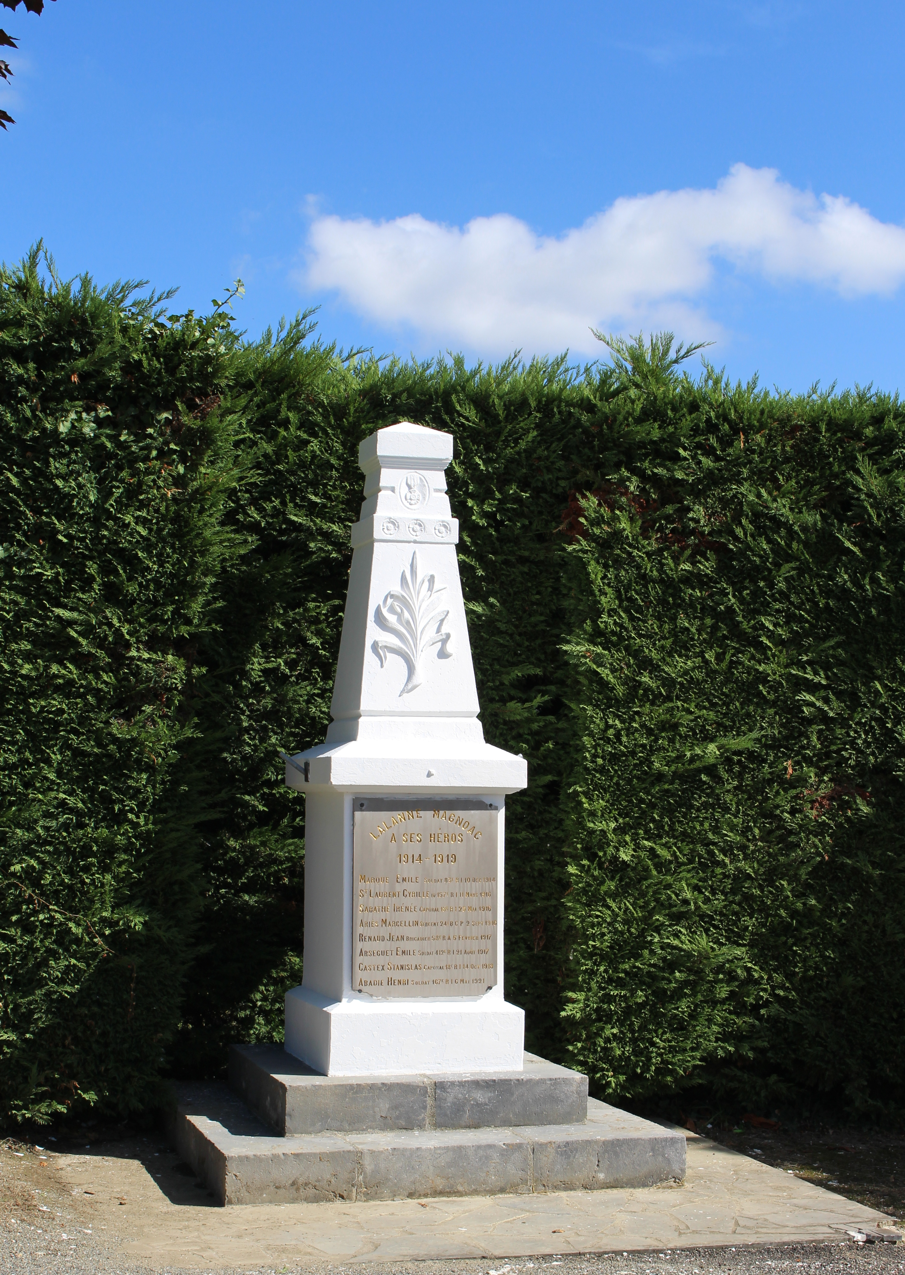 Monument aux morts de Lalanne (Hautes-Pyrénées)